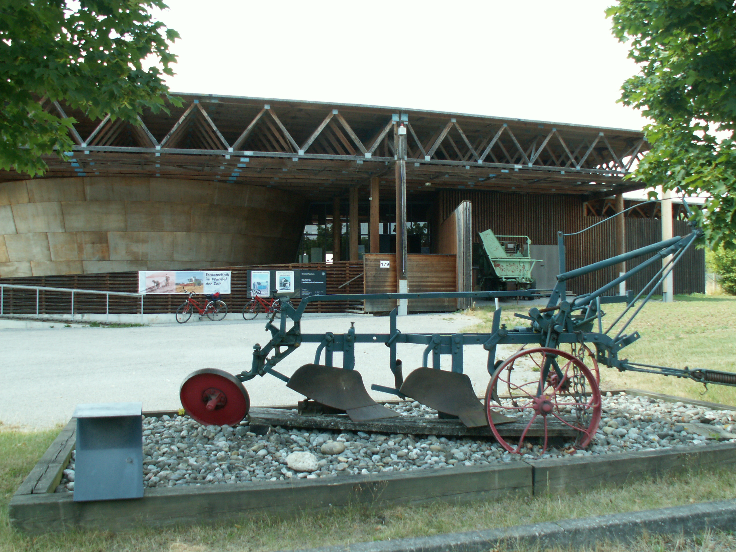 German Agricultural Museum, Plieningen near Stuttgart, Germany